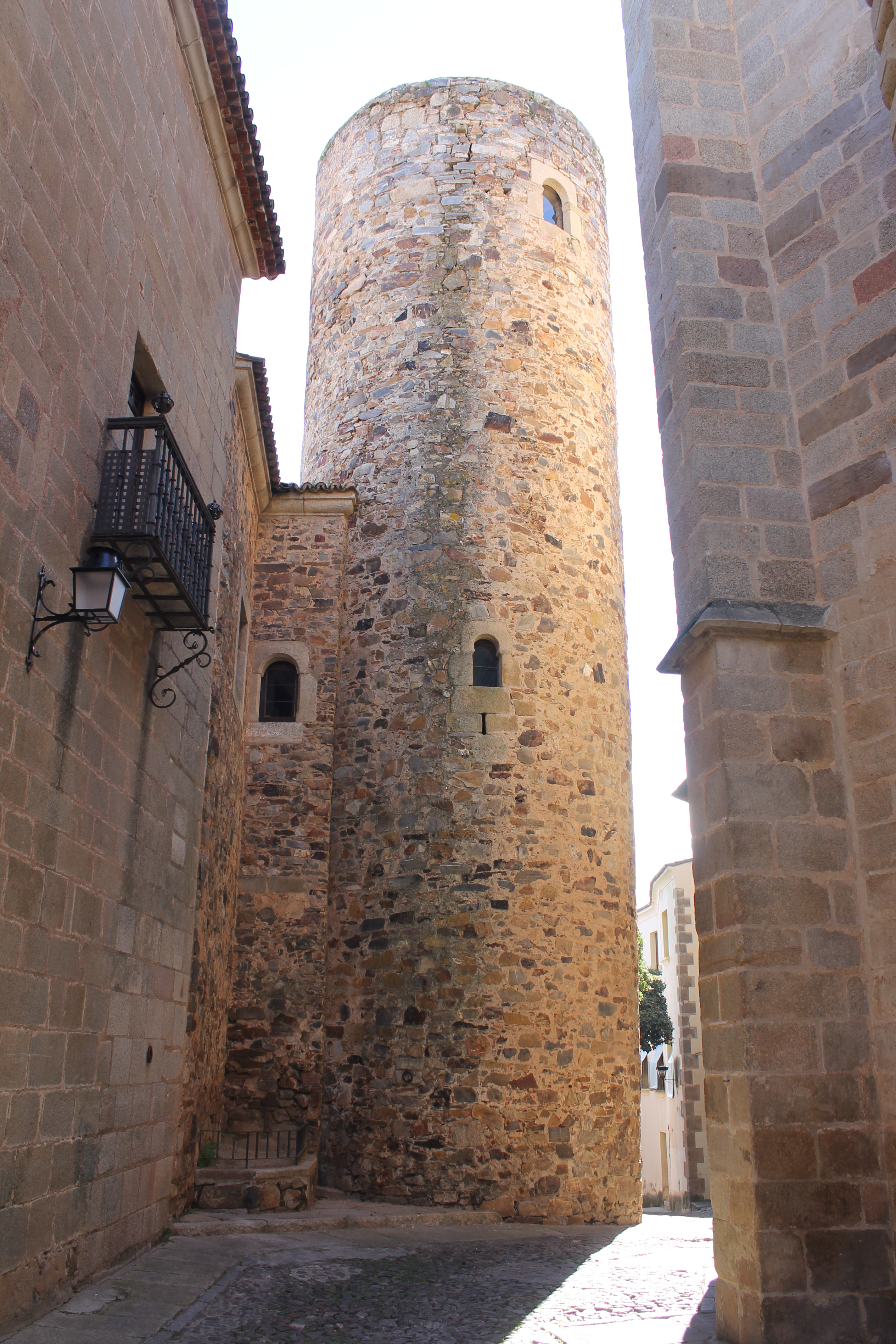 torre del palacio de Carvajal. Siglo XII-XIII